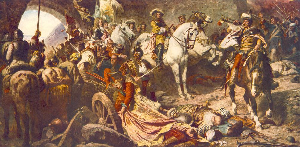 A lovon Lotaringiai Károly herceg, az előtérben sebesült karral, karddal a kezében Petneházy Dávid hajdúkapitány. Forr. MEK [1] Magyar Nemzeti Galéria, Budapest